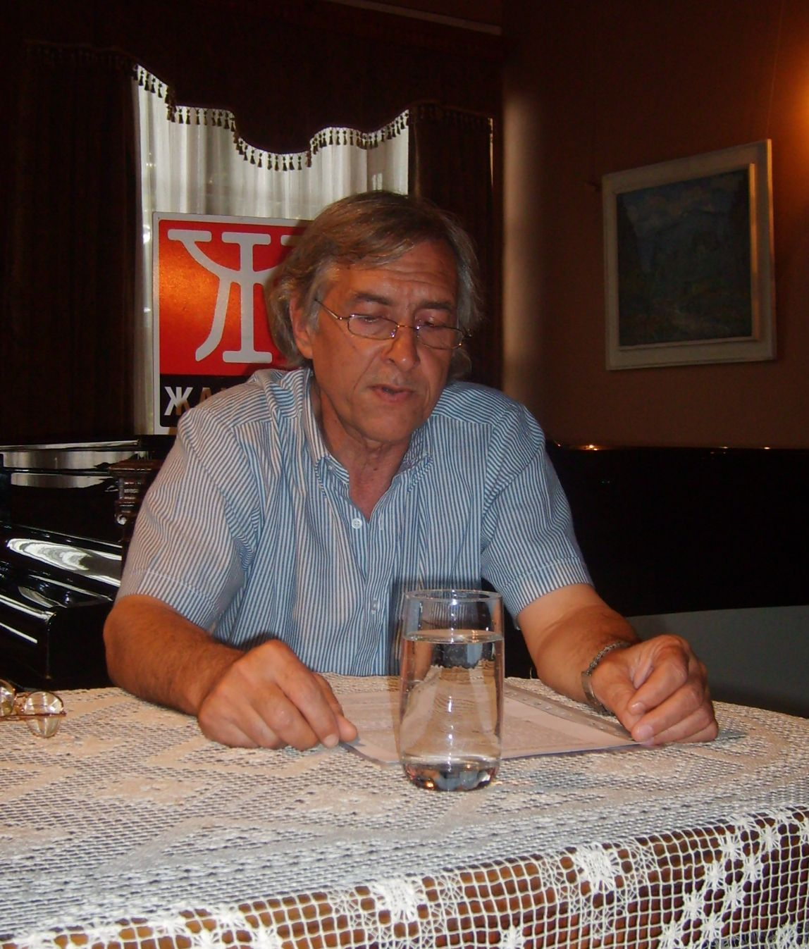 Писател, есеист, критик Пловдив, Балабанова къща, 1.06.2009 г.